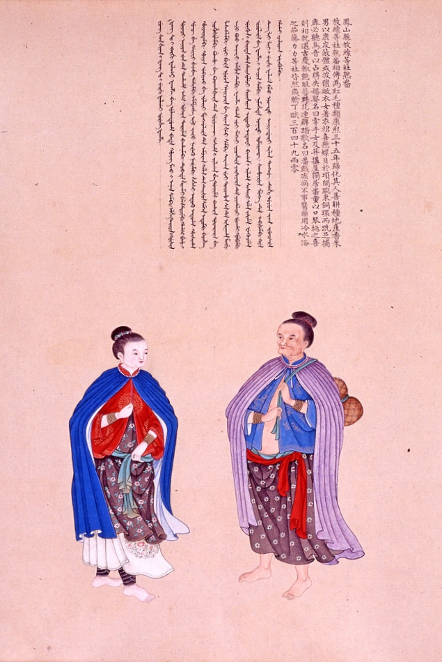 中文（香港）: 清 謝遂 職貢圖